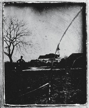 Cerklje na Gorenjskem in 1860 hyalotype.